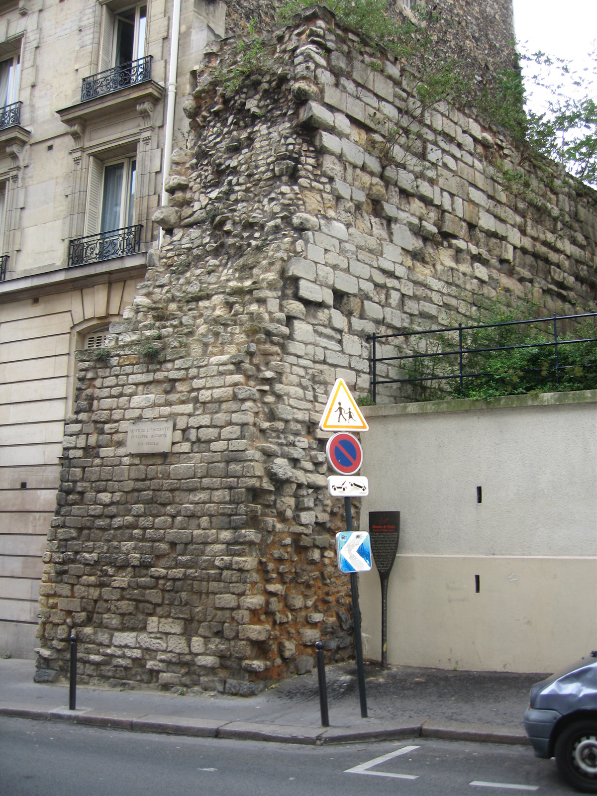 Portion de courtine du mur de Philippe Auguste visible rue de Clovis dans le Ve Arrondissement de Paris.